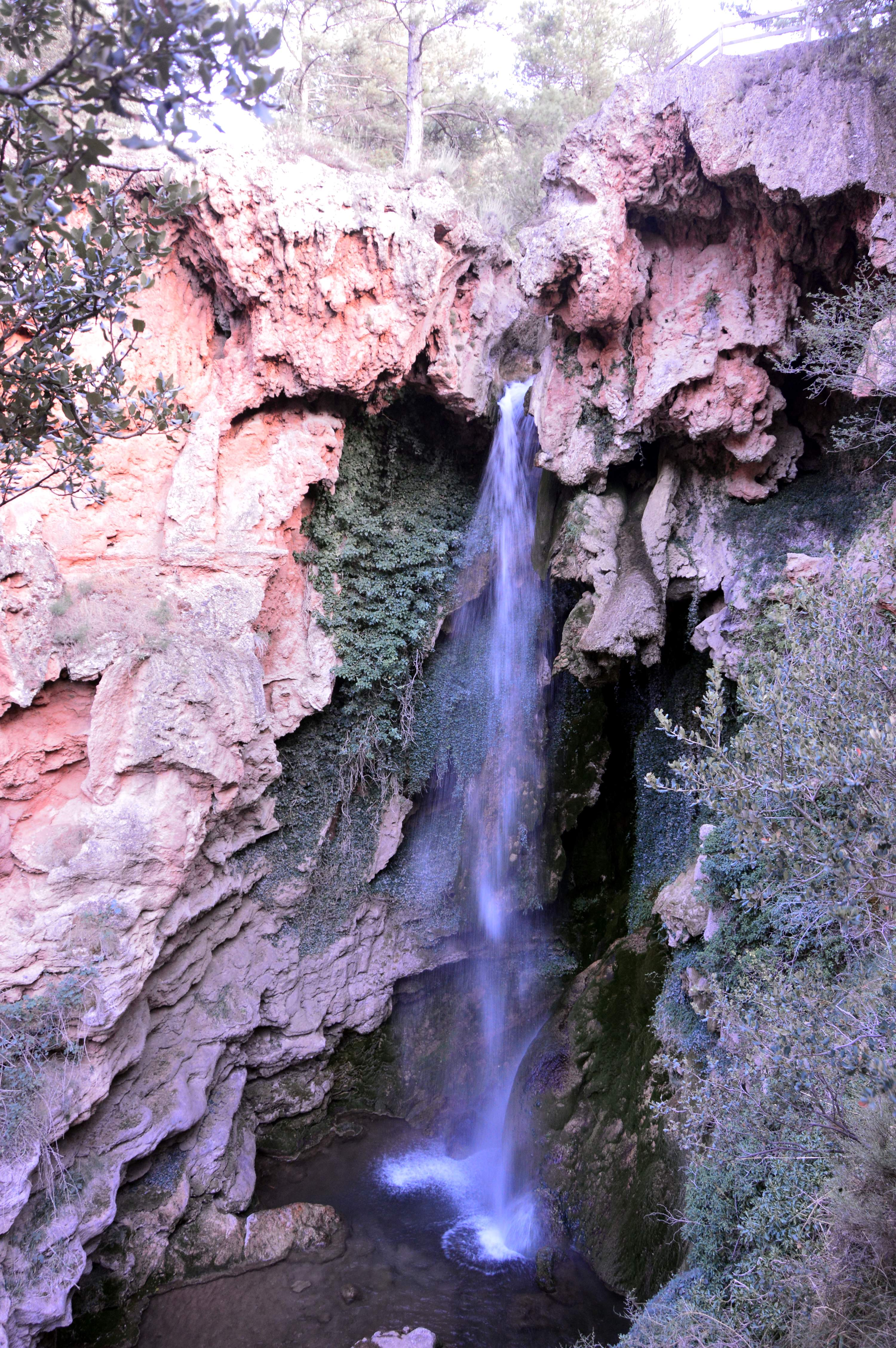 Paisaje fluvial en el paraje Los Amanaderos de Riodeva (Teruel), con detalle de la Caída de las Yegüas (2017).